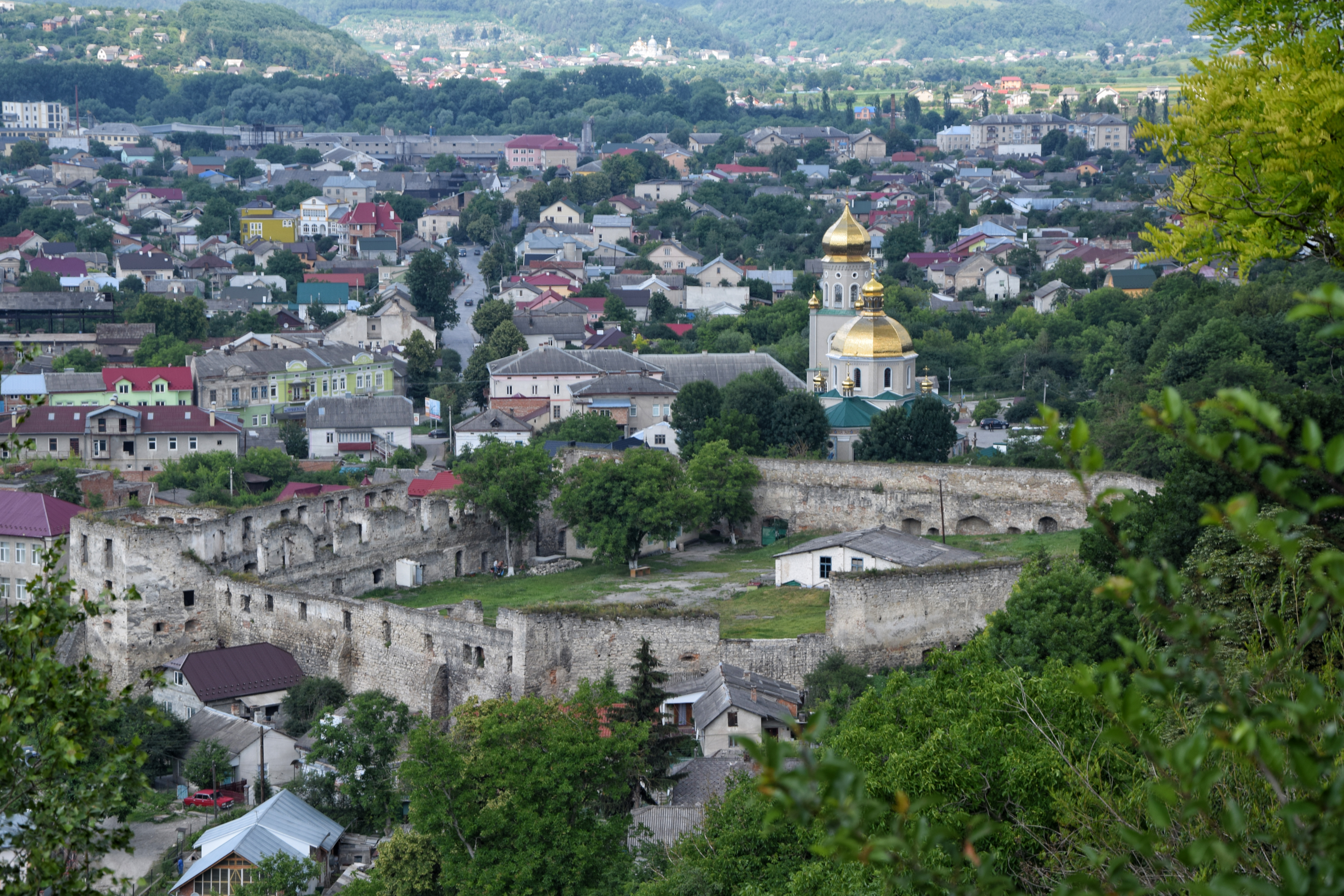 Чортків, Замок Гольських та Полкова церква